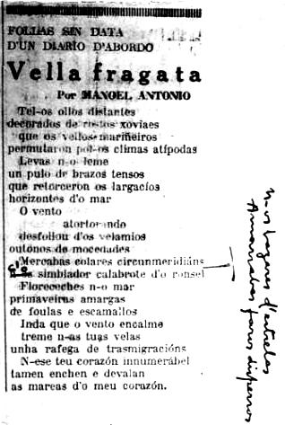 "Vella fragata"